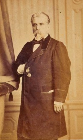 Manuel Arnús de Ferrer, fotografía de J. Laurent. Museo de Historia de Madrid